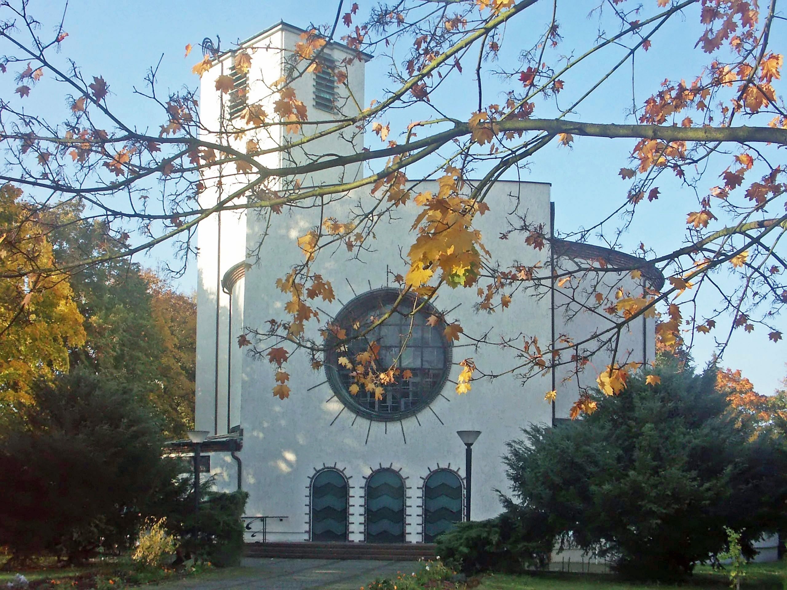 Katholische Kirche St.Bonifatius in Leipzig-Connewitz